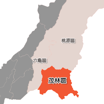 茂林區相對位置